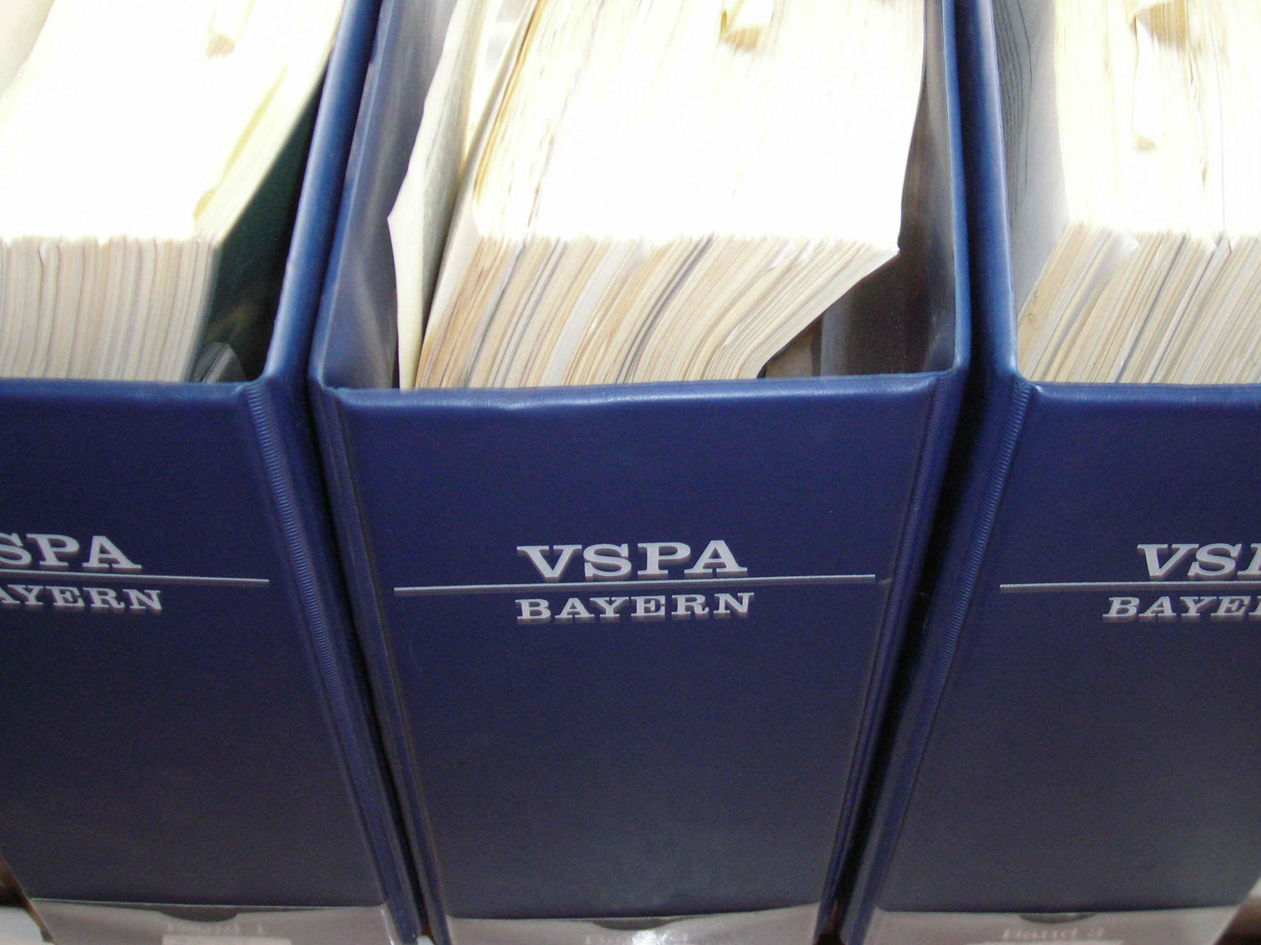 Vorschriftensammlung für die Polizeiausbildung in Bayern (VSPA Bayern) - Design um 1996